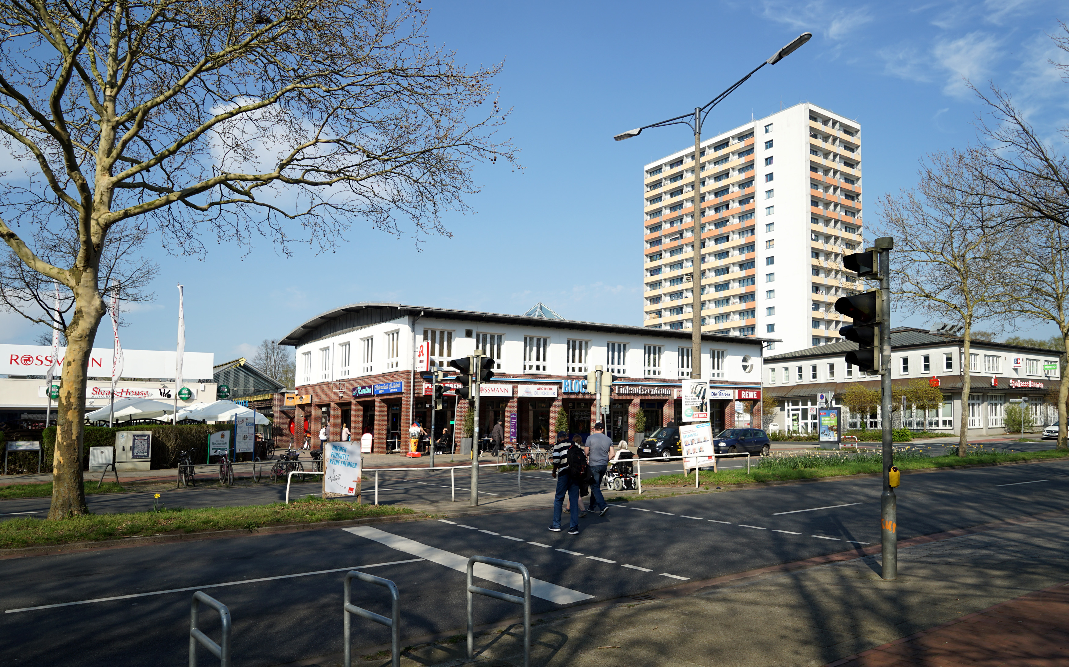 Bremen, Ludwig-Roselius-Allee, Eingang Einkaufszentrum Blockdiek und Hochhaus Geldener Straße 2, Überweg am Ellener Hof